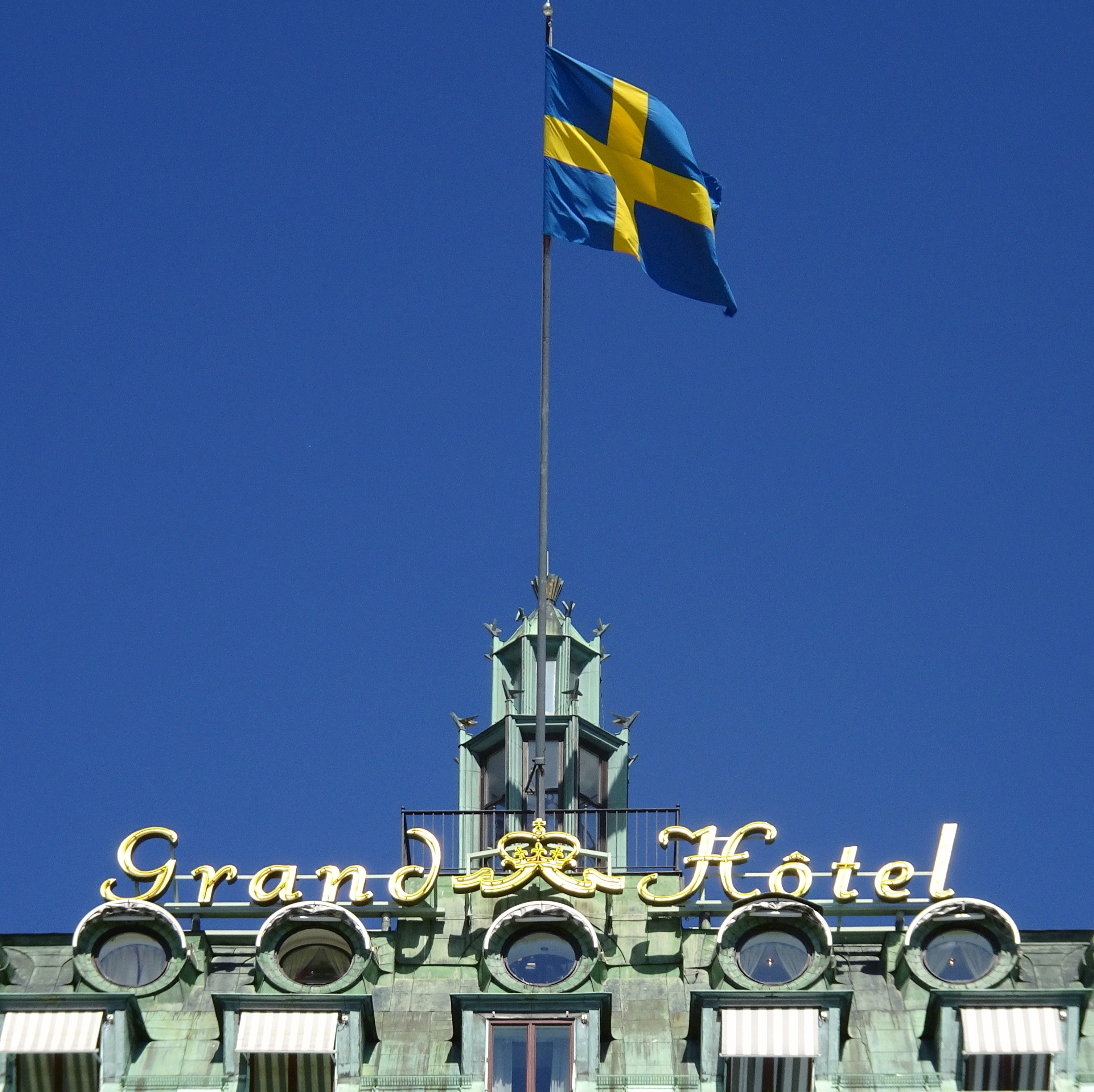 Grand Hôtel, Stockholm, neonskylt